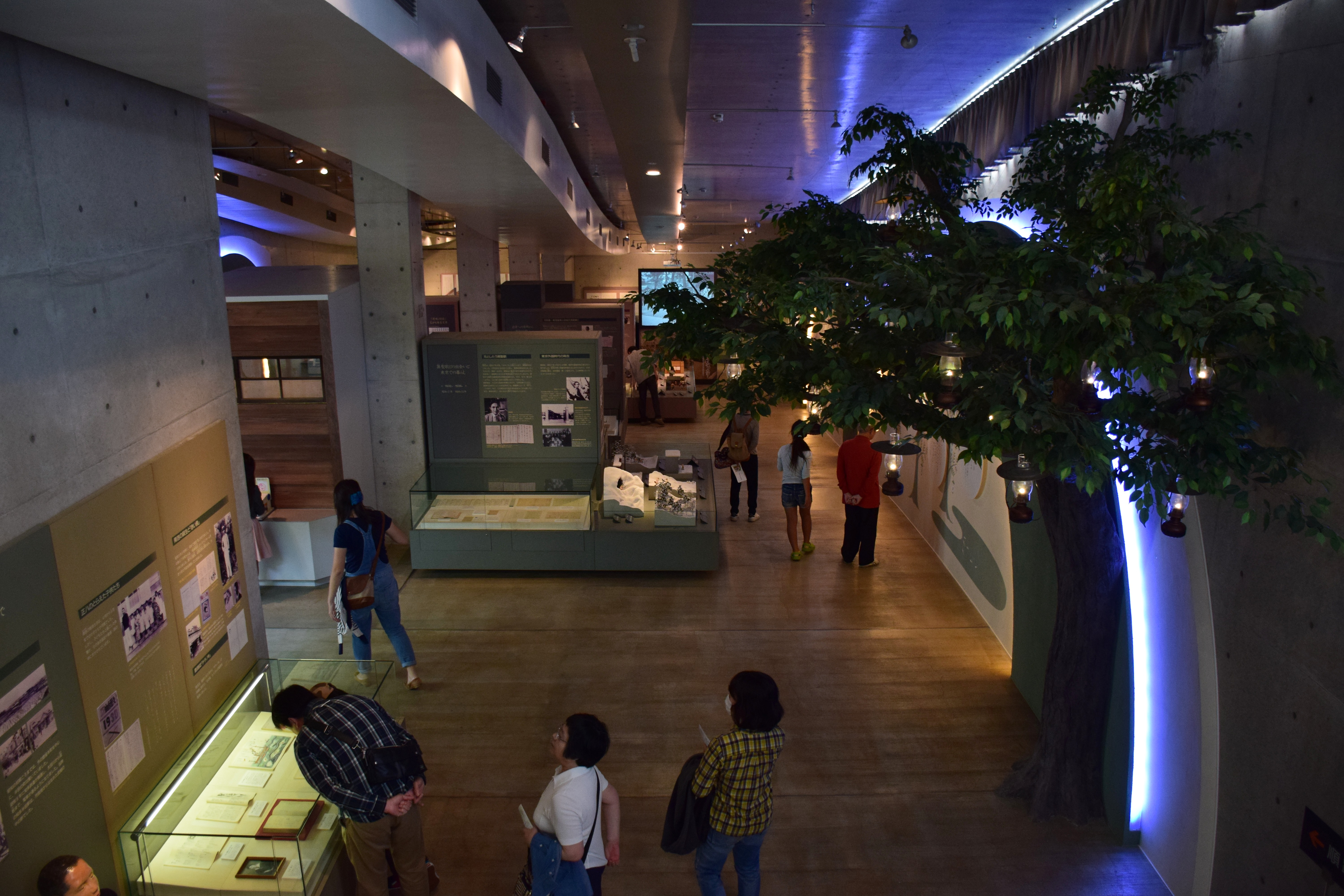 新美南吉記念館